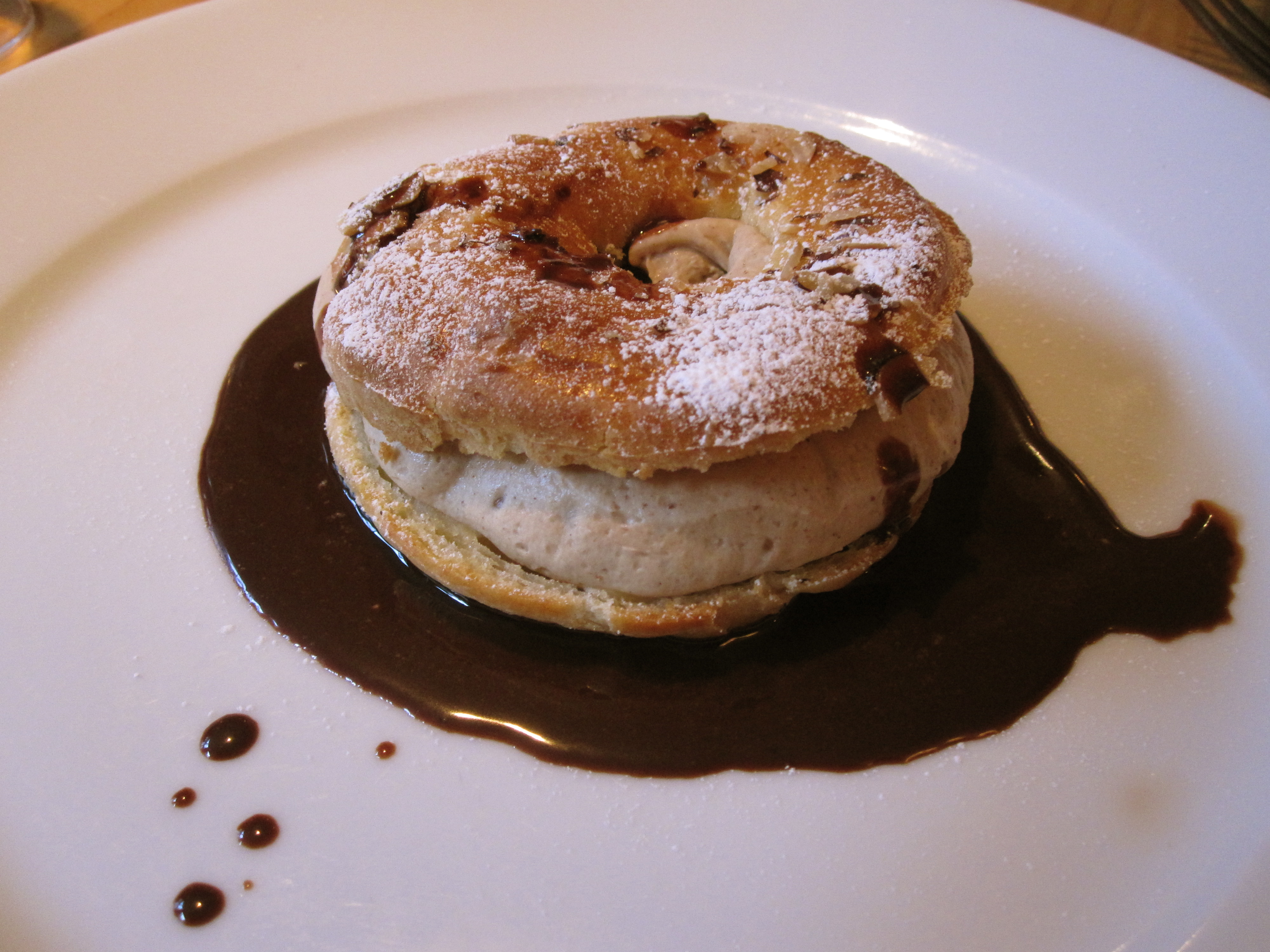 Pâtissserie Paris-Brest